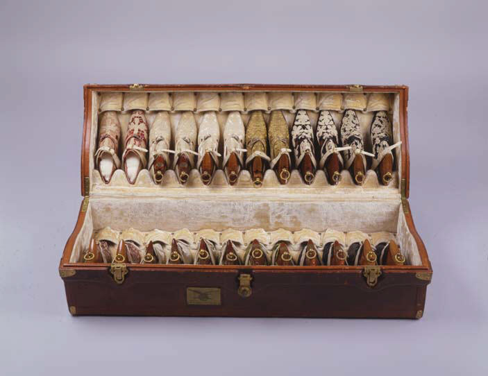 French; Pumps